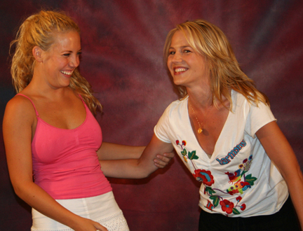 Julie Benz and Mercedes McNab at the Booster Bash